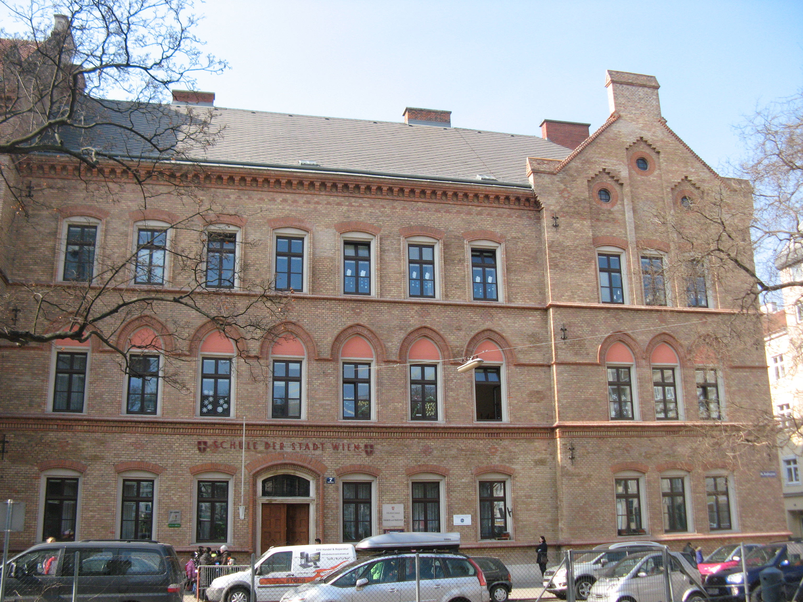 Volksschule, Keplerplatz 7, Wien-Favoriten